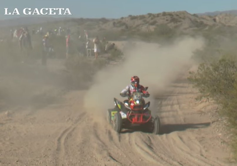 Dakar 2017. Tucumán (Argentina). Captura de La Gaceta (Mirá las máquinas del Dakar en su paso por Tucumán). Walter Nosiglia